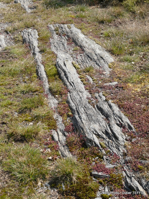 Schiste affleurant sur les landes de la Ville-au-Chef